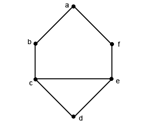 Graphe non oriente a 6 sommets